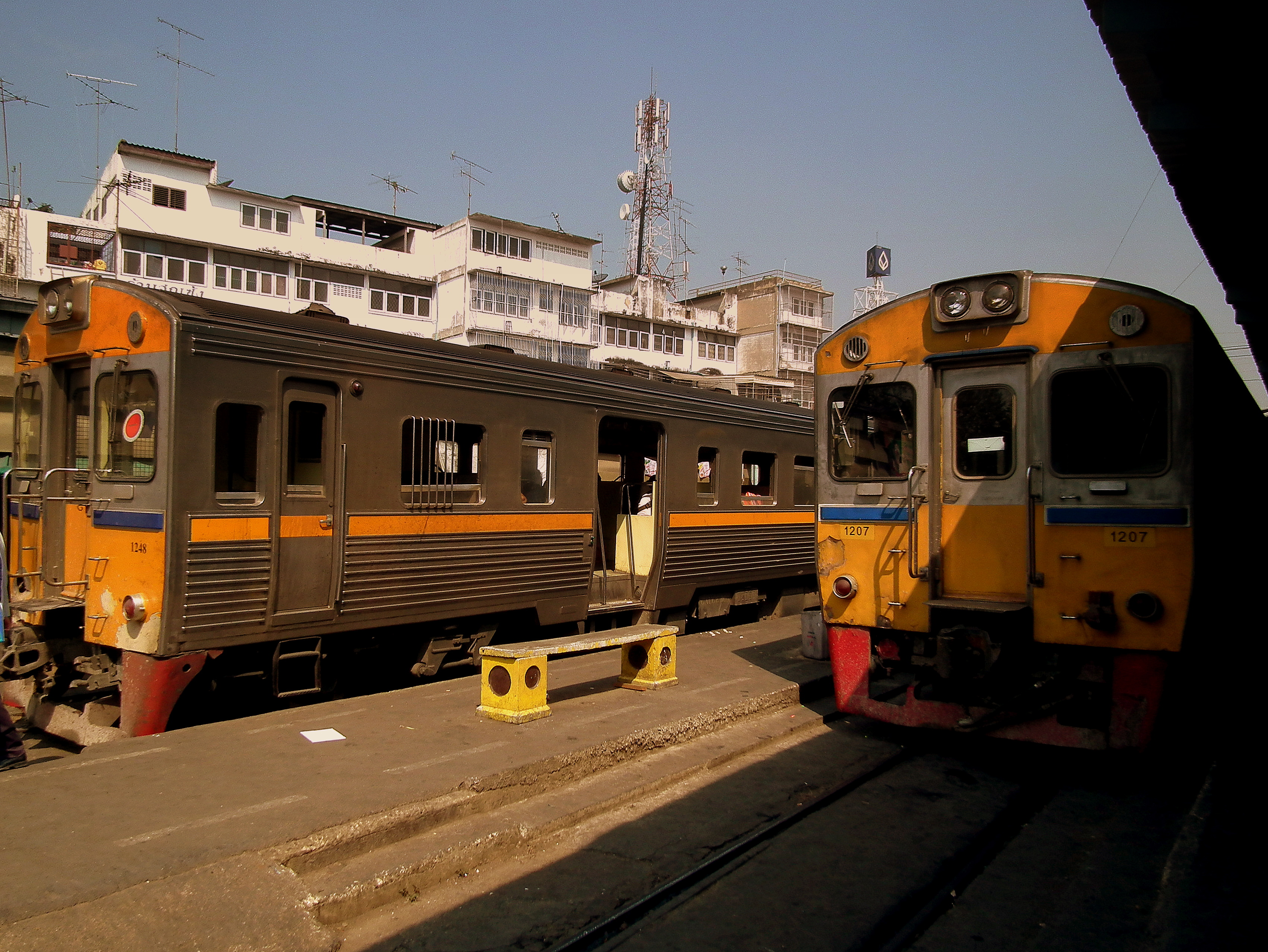 MAHACHAI STATION THAILAND JAN 2012